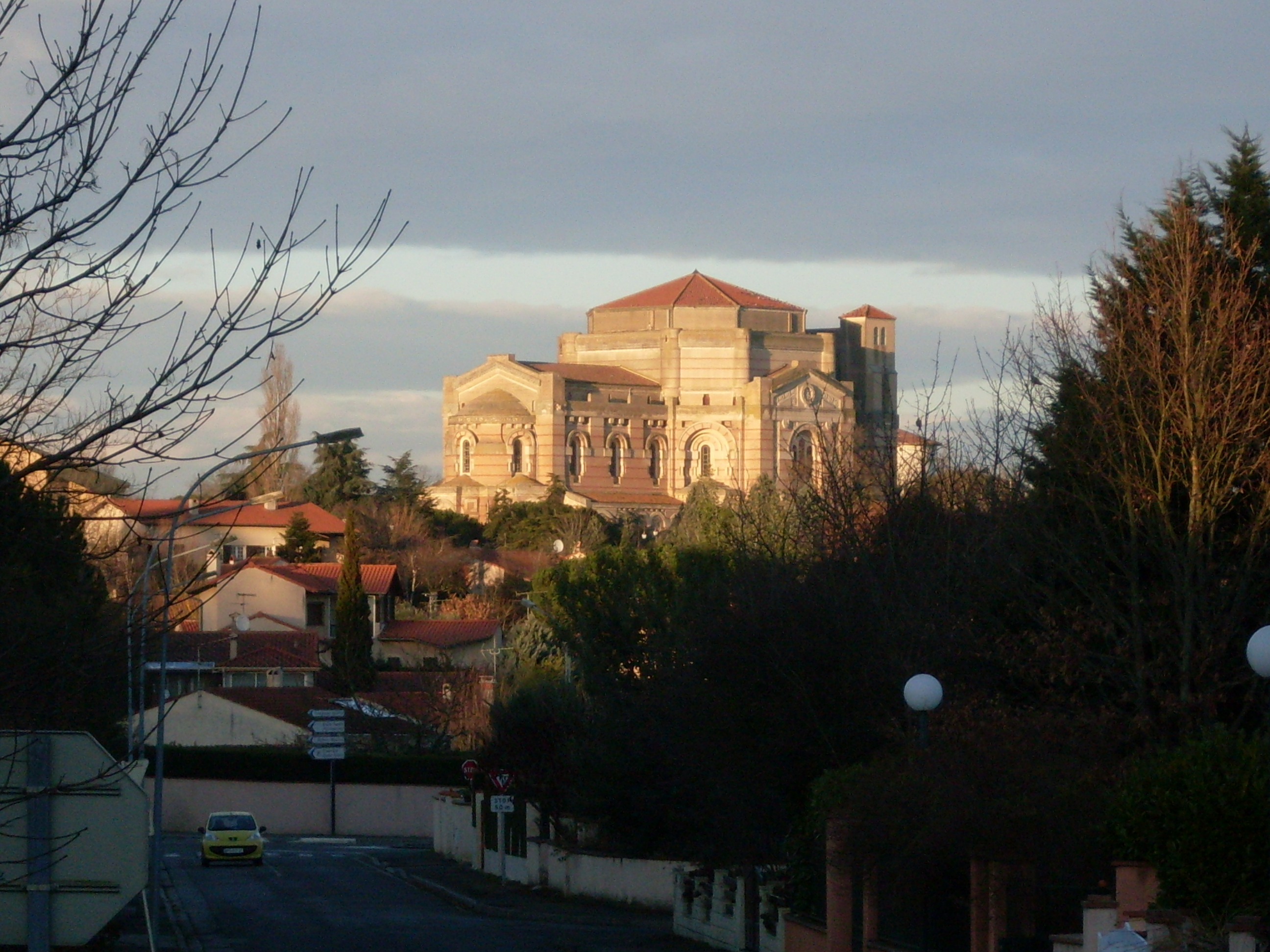 La basilique de Pibrac (Haute-Garonne, France).